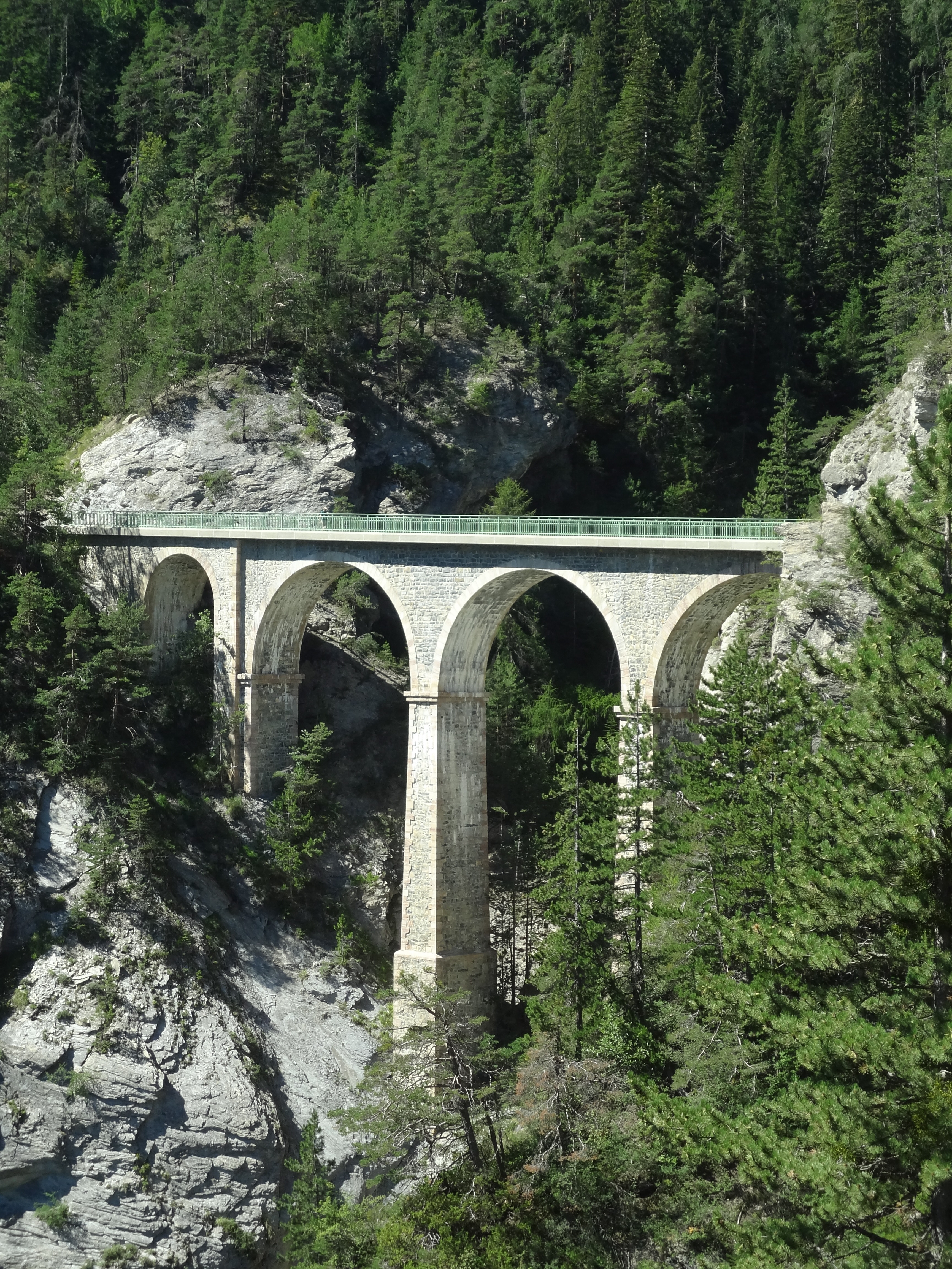 Pont du Fau, Uvernet-Fours (Alpes-de-Haute-Provence), RD 908, 1350 m d’altitude